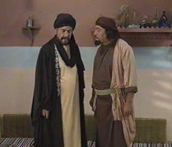 wamadat01